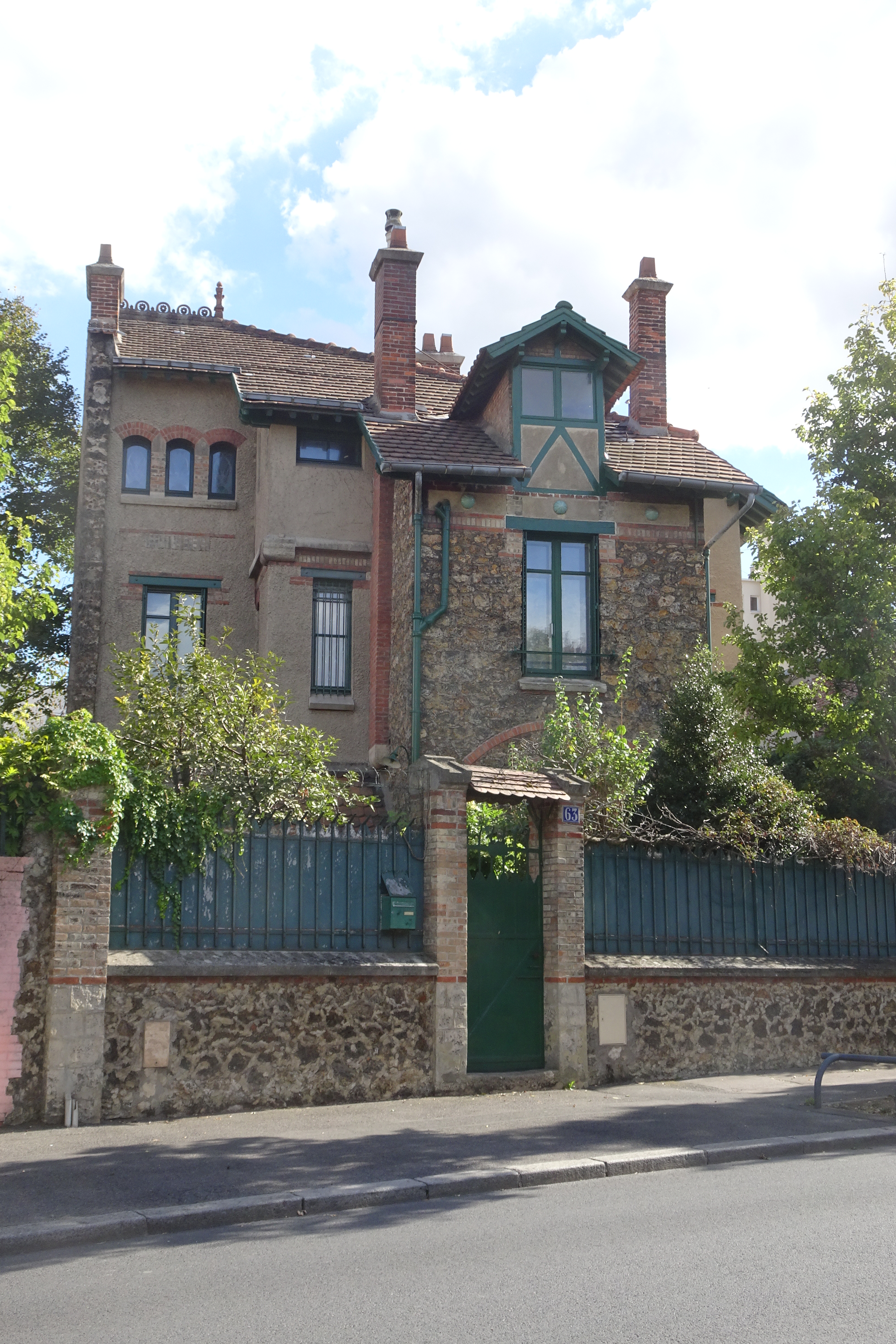 Villa Jassédé - Issy les Moulineaux - Hector Guimard